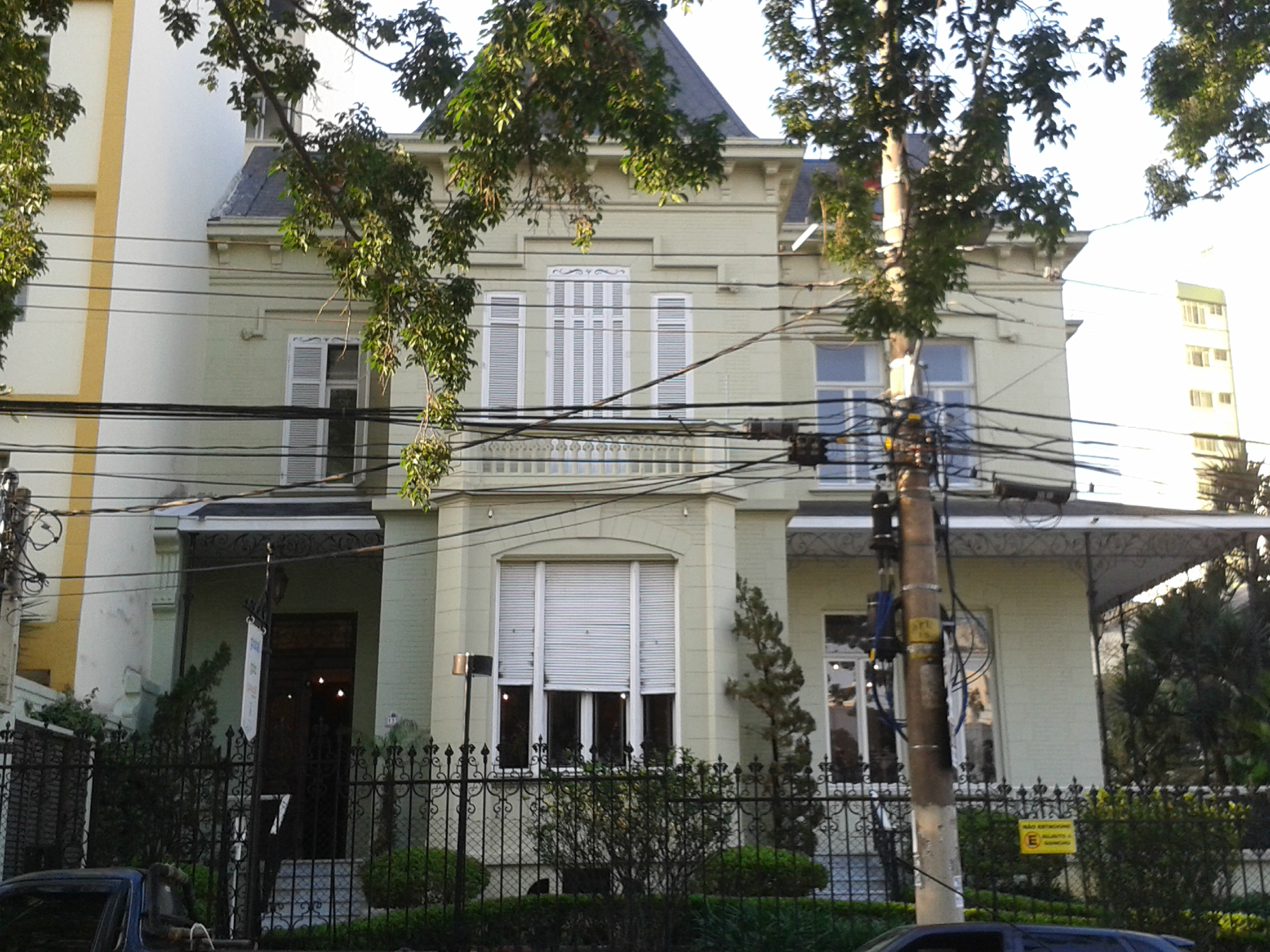 Fachada frontal das Residencias da Família Ramos de Azevedo, em São Paulo (SP), Brasil